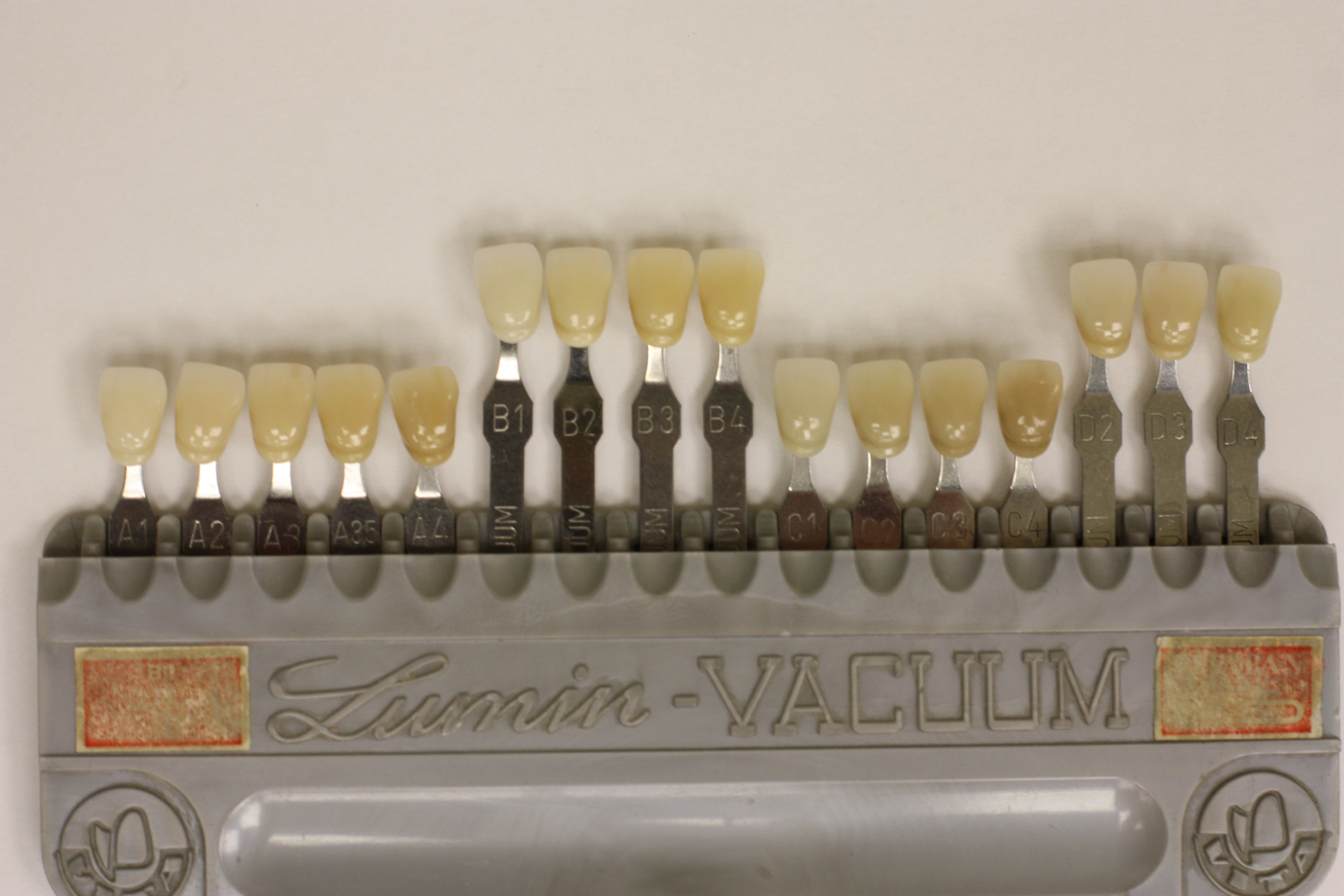 Zahnfarbe Frabring, Zahnfarbbestimmung, Bio-Farbring, VITA-Farbring, Farbring für Composits